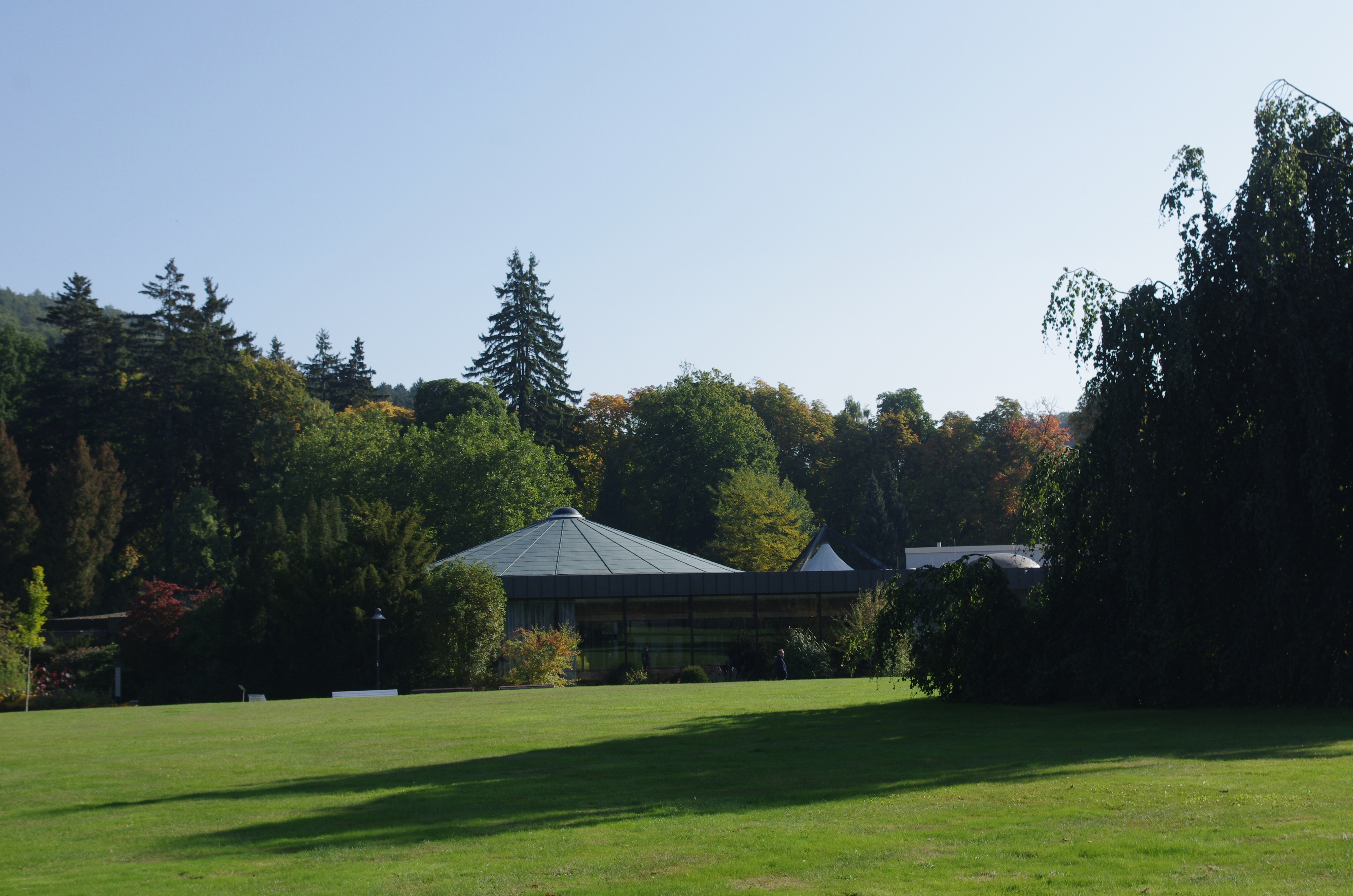 Bad Wildungen, Ortsteil Bad Reinhardtshausen in Hessen. Die Wandelhalle im Kurpark.